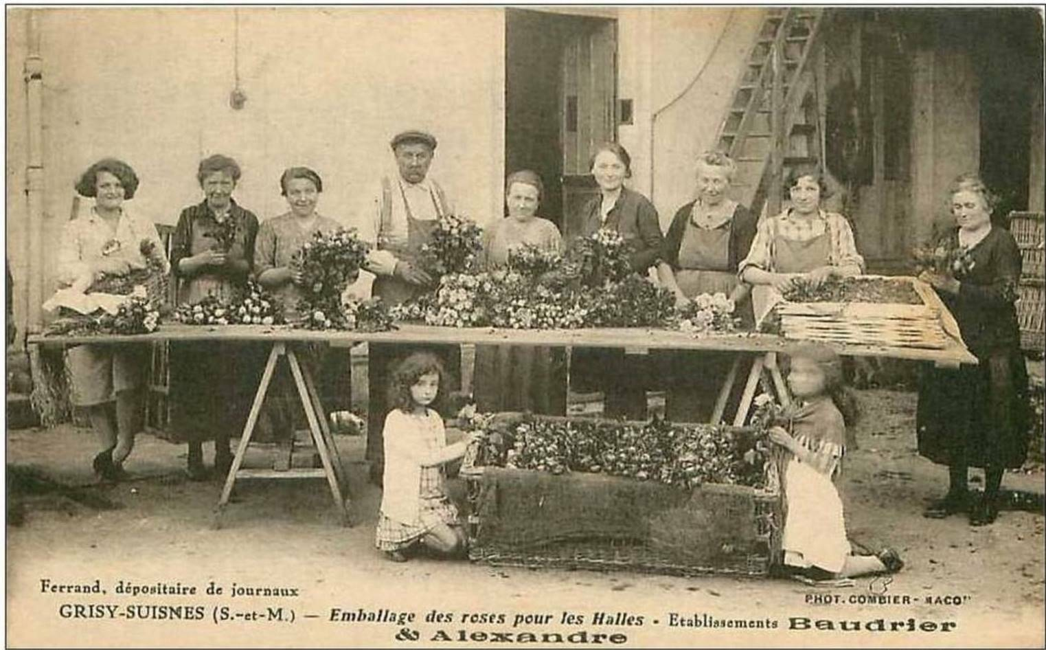 CPA : emballage des roses à Grisy-Suisnes pour l'expédition aux Halles de Paris. Établissements Baudrier et Alexandre, vers 1925.